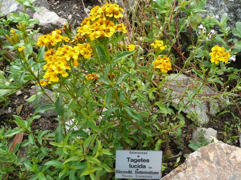 Tagetes lucida, Botanischer Garten Erlangen, 2008